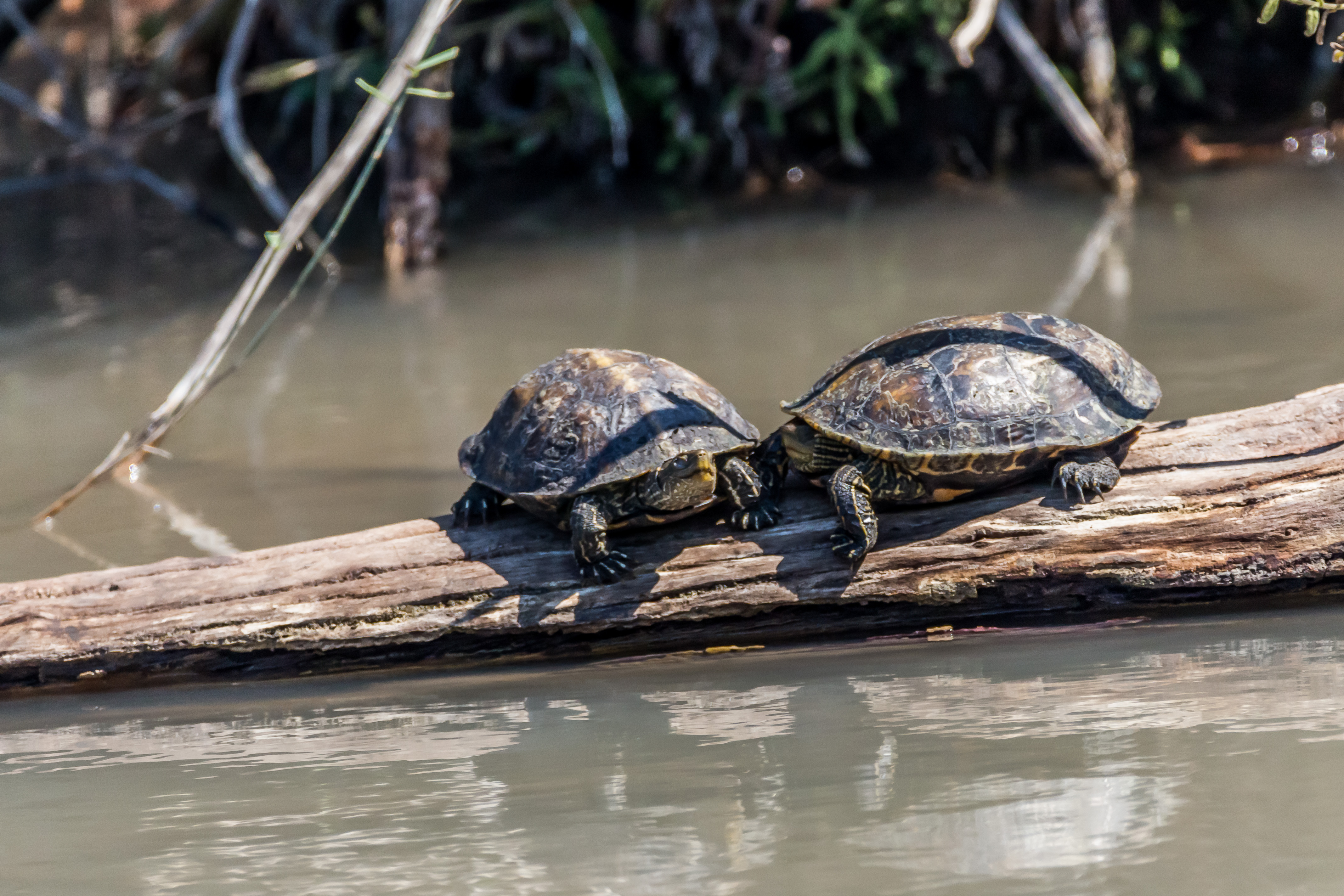 שמורת טבע בעמק זבולון, מזרחית לקריית ביאליק. השמורה כוללת הן את המעיינות והביצות המהווים את מקורו של נחל נעמן והן את האתר הארכאולוגי תל אפק. השמורה הוכרזה ב-1979 והיא משתרעת על פני 660 דונם. ב-1996 הוכרה השמורה כ"אתר רמסר" בהתאם לאמנת רמסר לשימור ולפיתוח בר-קיימא של בתי גידול לחים.